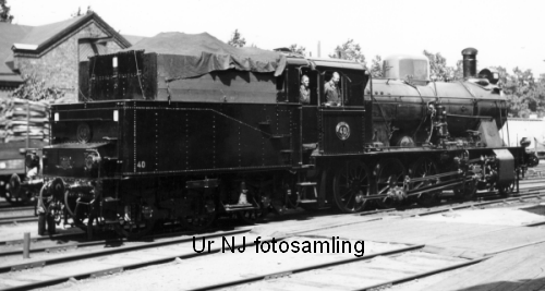 HNJ lok litt G10 Nr 40 i Halmstad 1945. Loket är nyputsat och försett med påbyggnader för torveldning.